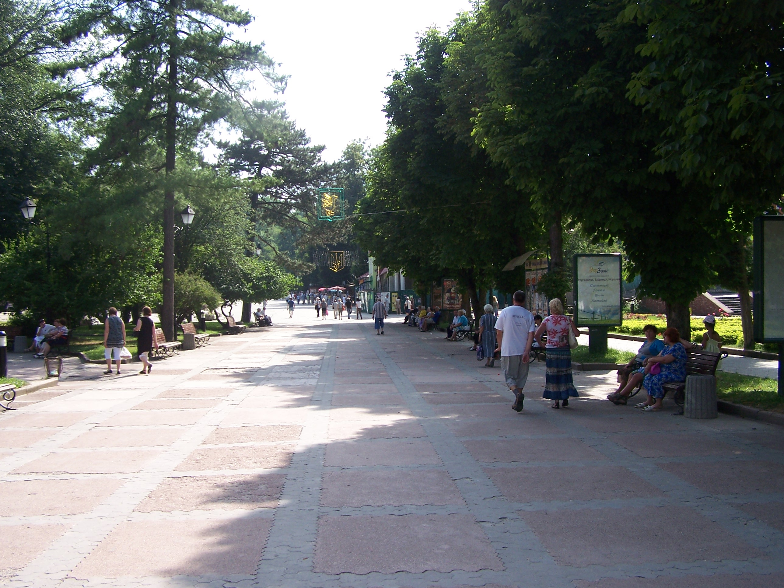 Truskavets, Lviv Oblast, Ukraine, 82200